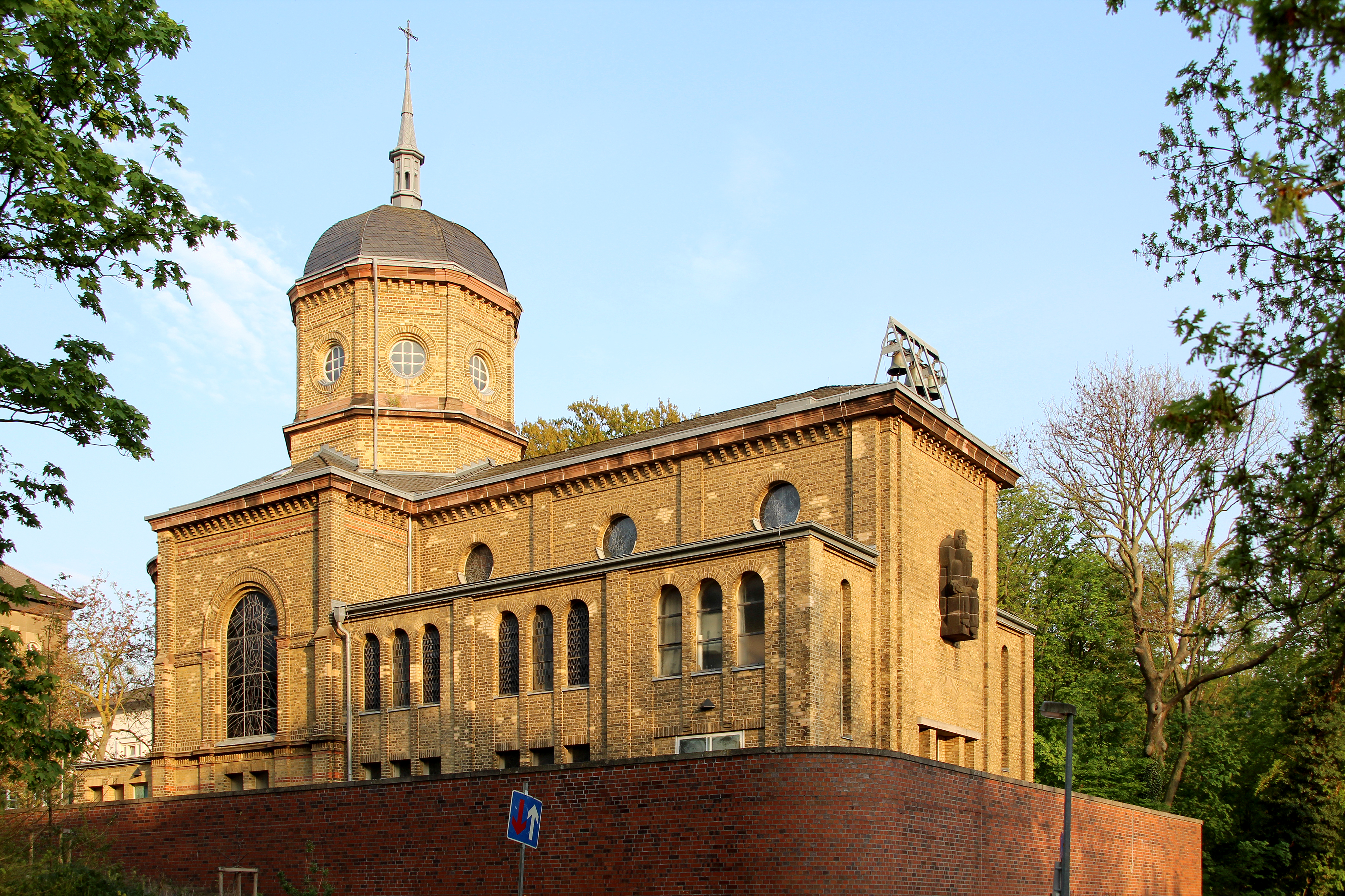 Nordwestansicht der Herz-Jesu-Kirche auf dem Gelände der LVR-Klinik Düren.